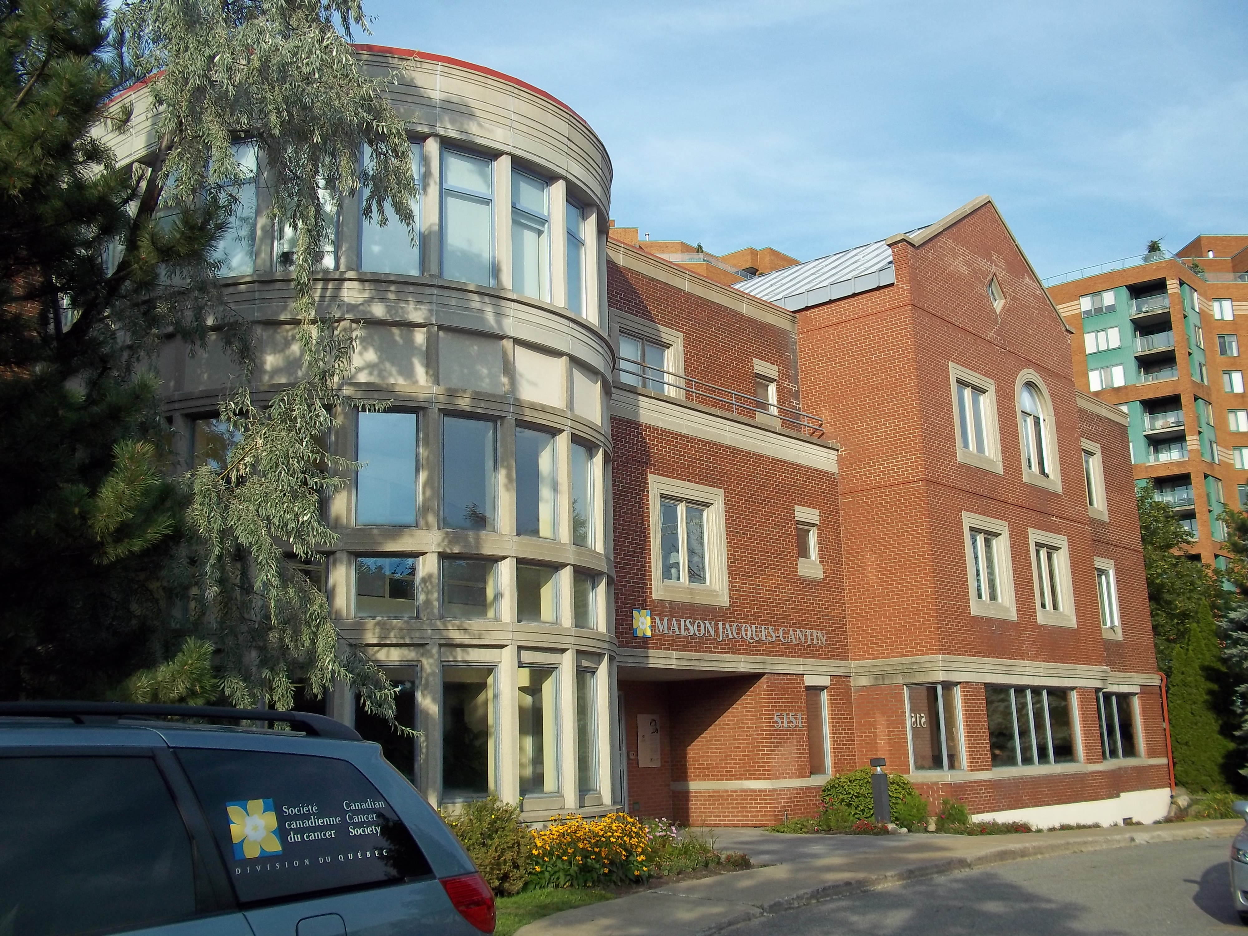 Maison Jacques-Cantin, 5151, boulevard de l'Assomption, Montréal - « La Maison Jacques-Cantin est destinée aux personnes autonomes qui viennent de l’extérieur pour suivre un traitement de cancer dans les hôpitaux de Montréal ou pour profiter d’un service de répit durant les fins de semaine. » info